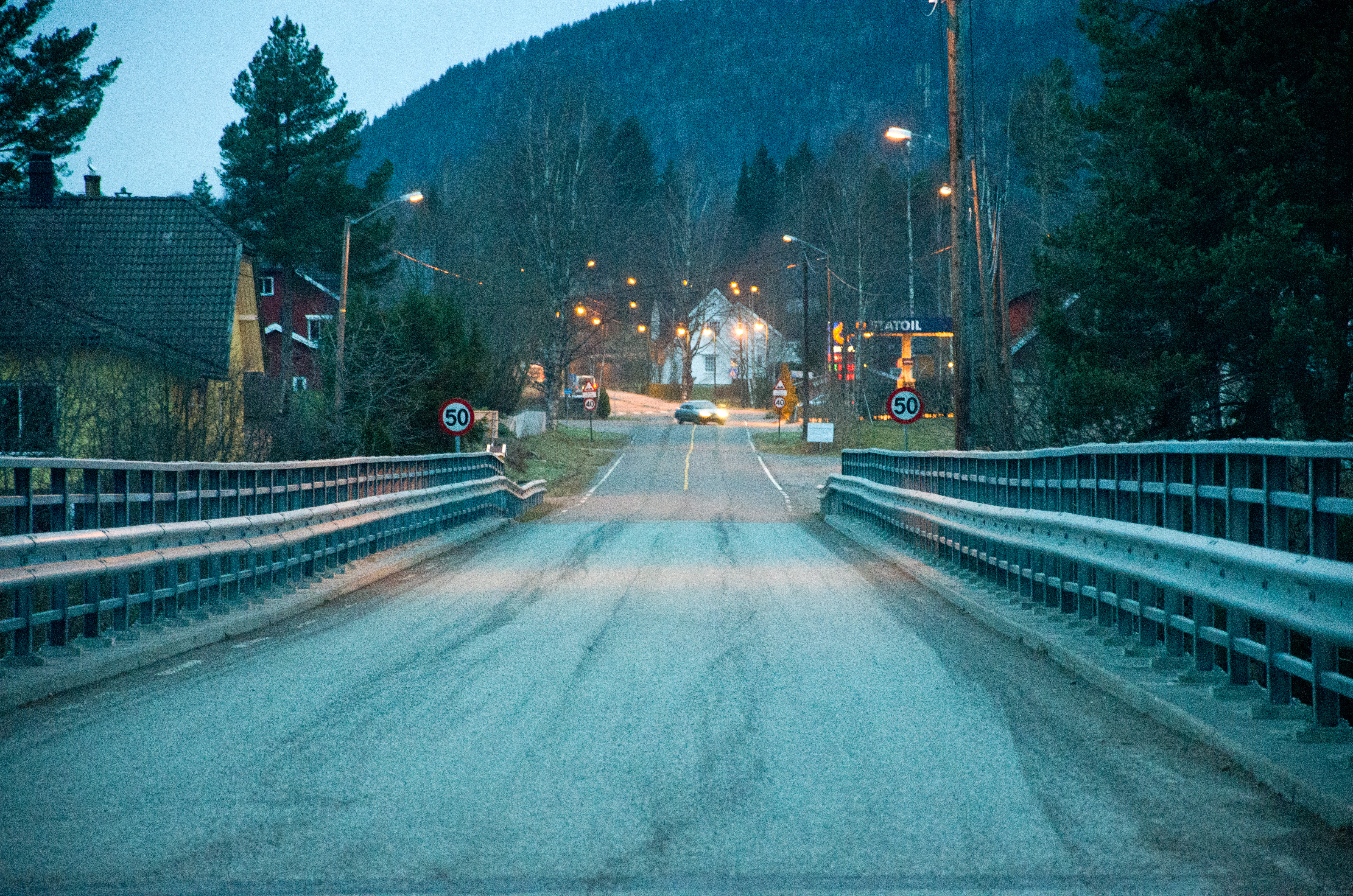 Fylkesvei 221 Lågaveien i Svarstad, Lardal, Vestfold